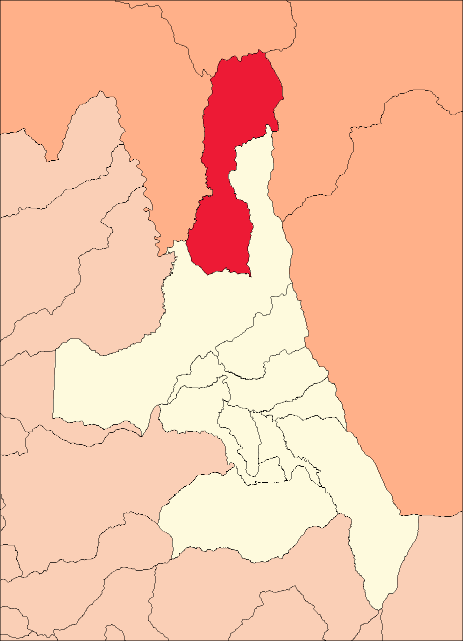 Área del distrito de Pucayacu.